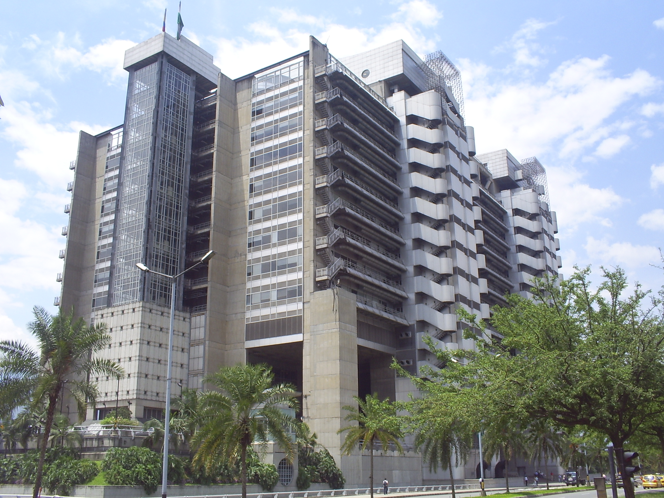 Edificio Empresas Publicas de Medellín, mas conocido como edificio inteligente, Medellín, Colombia.